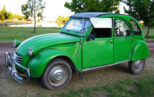 Produção: 1948-1990